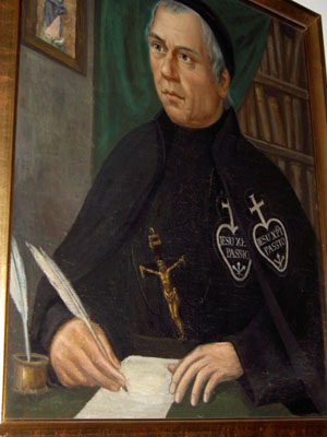 Photo d'une peinture de Dominique Barberi, prêtre, né à Viterbo en 1792, mort en Angleterre en 1849.